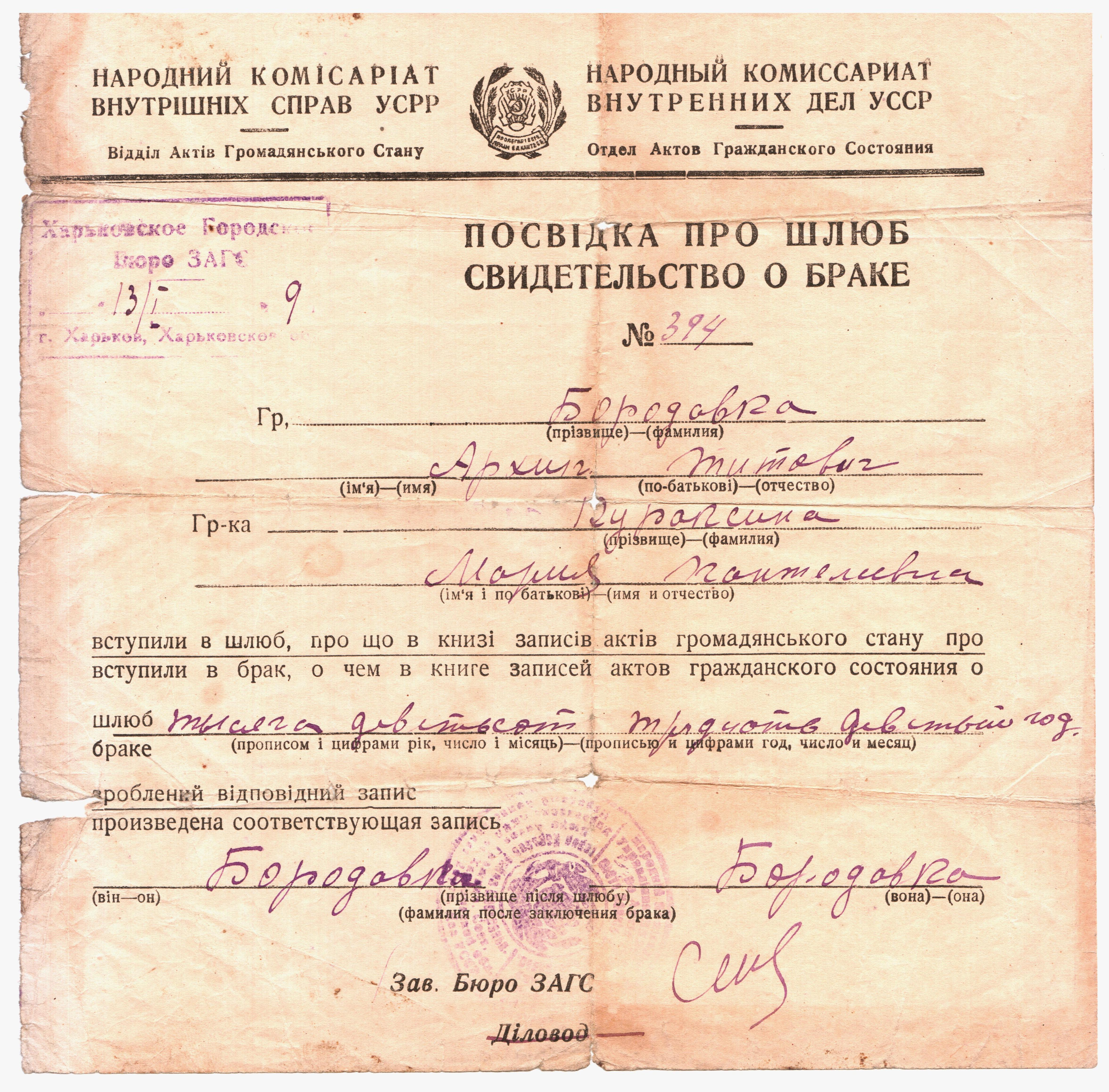 НКВС УСРР. Харьківське міське бюро РАГС. Посвідка про брак.